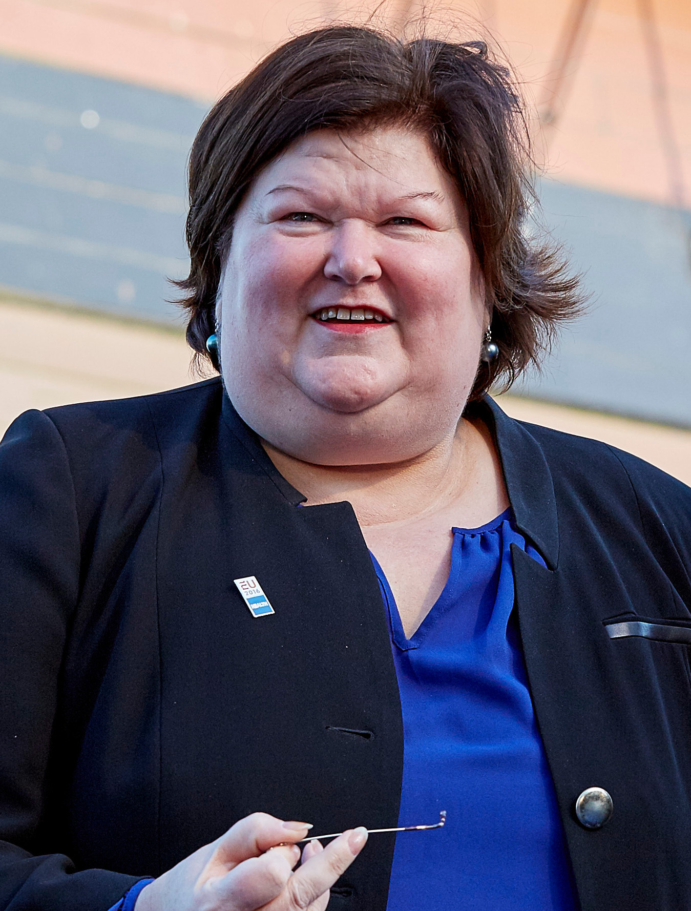 Informal Meeting Ministers of Health Amsterdam, 18 april 2016 / Amsterdam, April 18th 2016. Ministers van Volksgezondheid in Amsterdam met minister Edith Schippers. Ministers of Health with Dutch minister Edith Schippers. Foto: Rijksoverheid/Martijn Beekman – Photograph: Dutch Government/Martijn Beekman